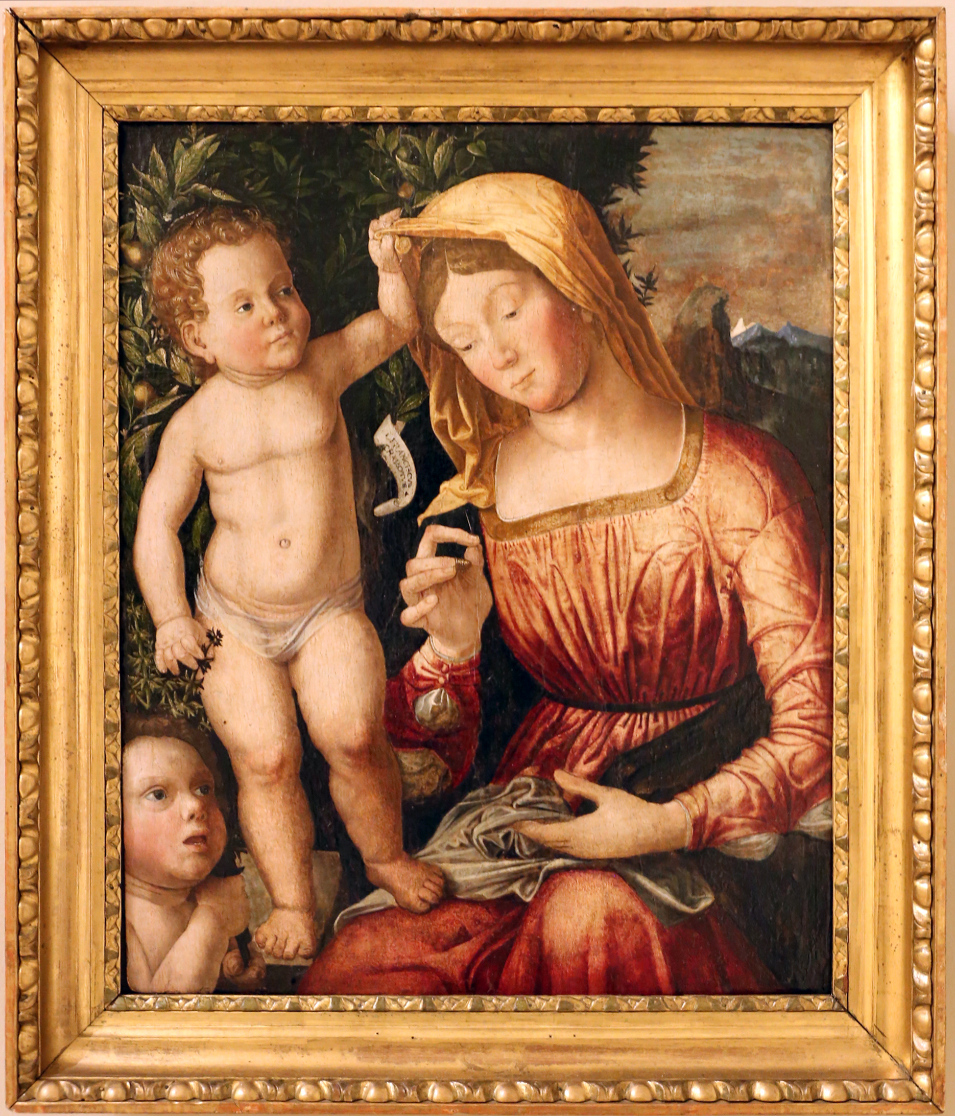 Palazzo dei Musei (Modena) This is a photo of a monument which is part of cultural heritage of Italy.